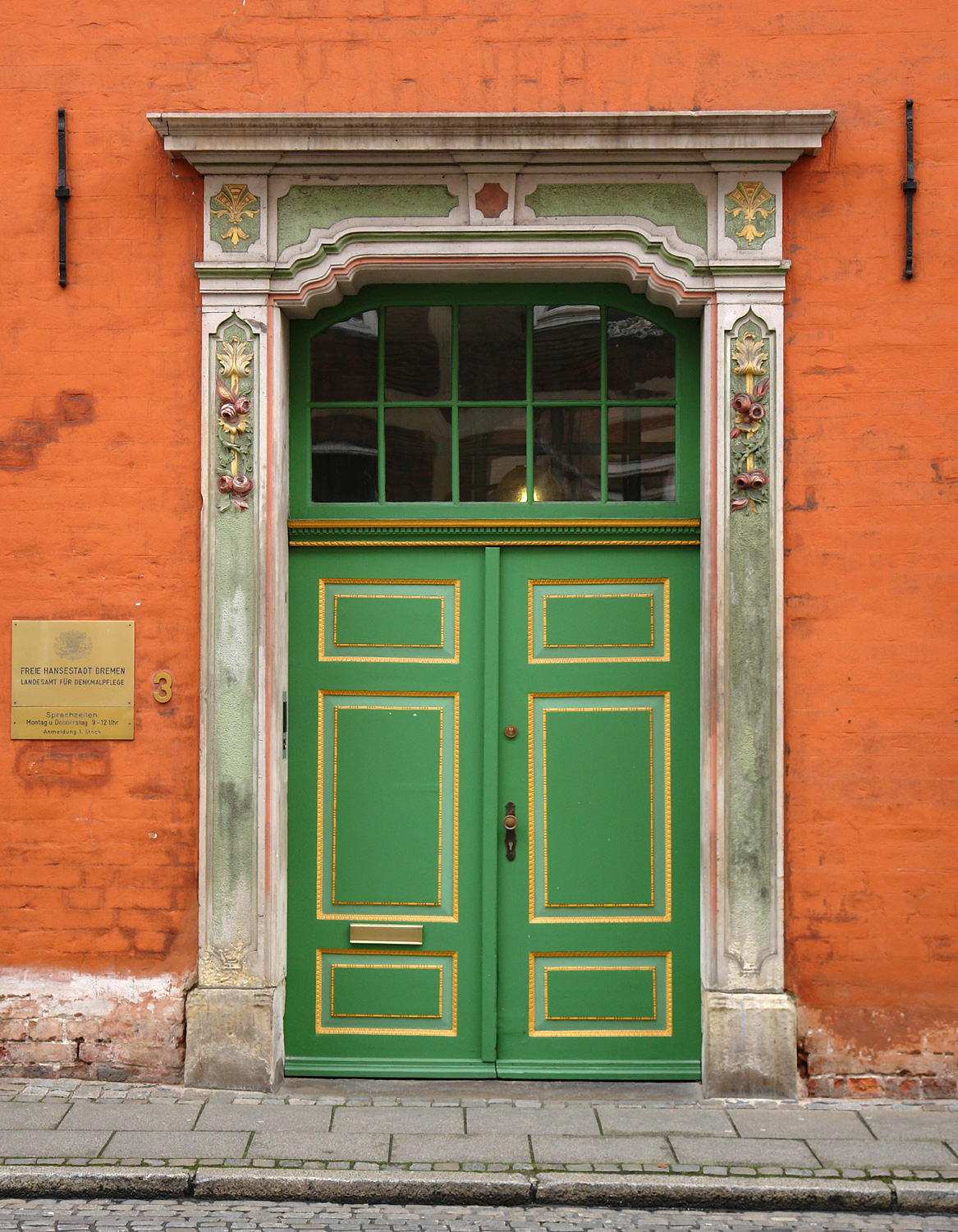 Bremen: Haus Heineken in der Sandstraße 3. Eingangsportal von 1744